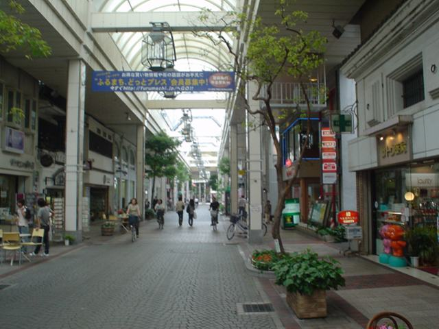 Furumachi-dori Shopping Mall, Niigata City